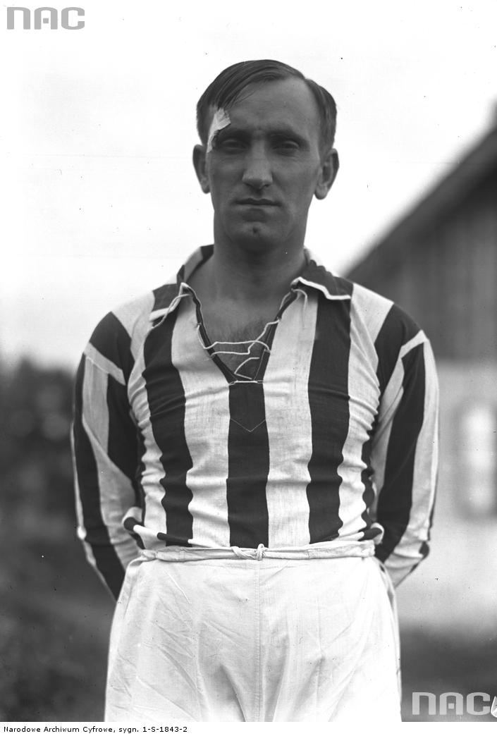 Józef Kałuża w barwach Cracovii